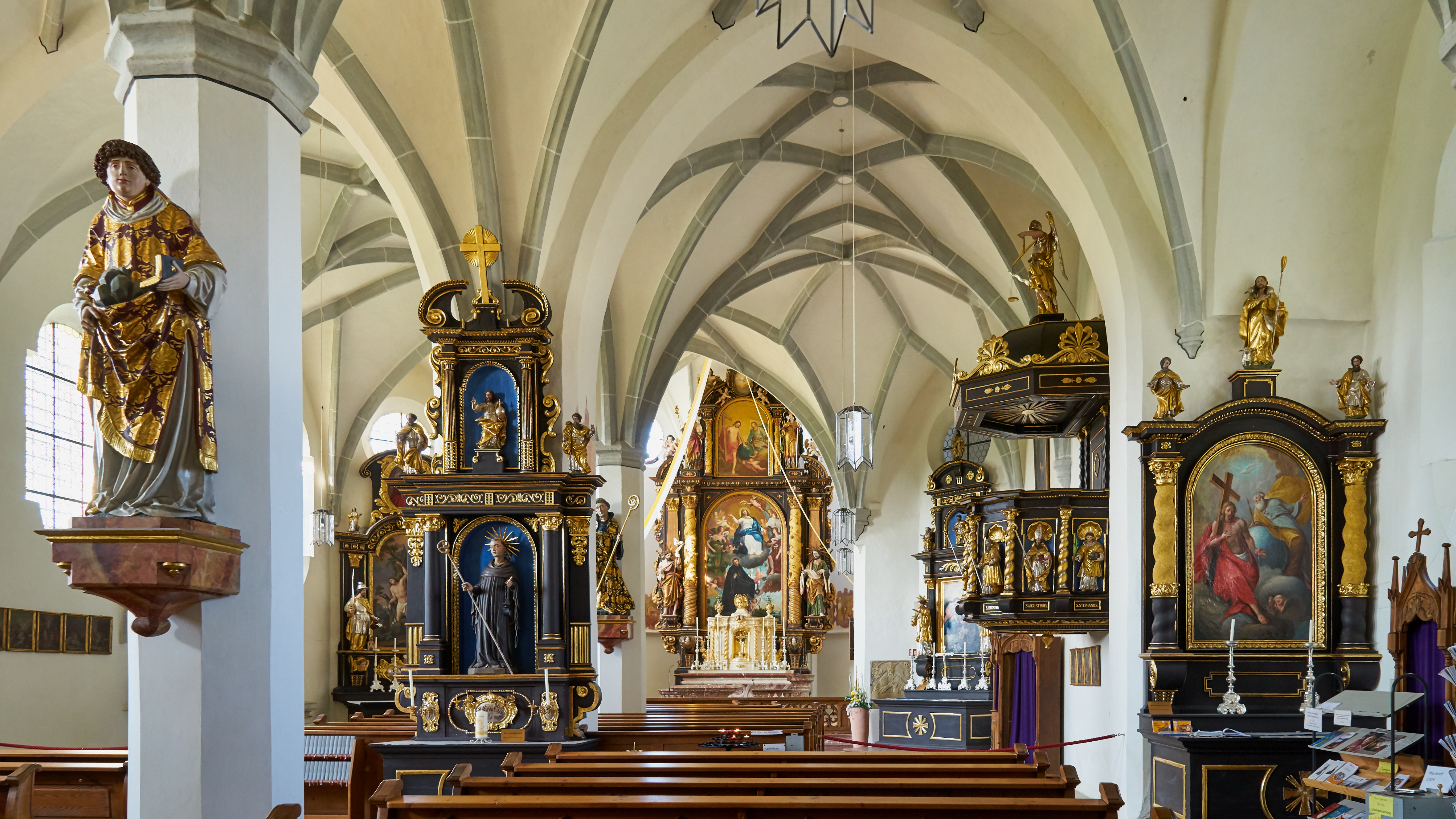 Die zweischiffige gotische Hallenkirche ist im niederbayrischen Raum selten. Im Chor und im Langhaus sind Netzgewölbe zu sehen, die Gewölbe des Hauptschiffes ruhen auf vier oktogonen Mittelpfeilern. Die spätgotische Empore ist mit einem Kreuzrippengewölbe ausgestattet, die Empore wurde in der Barockzeit um fast eine Jochlänge in das Hauptschiff erweitert.